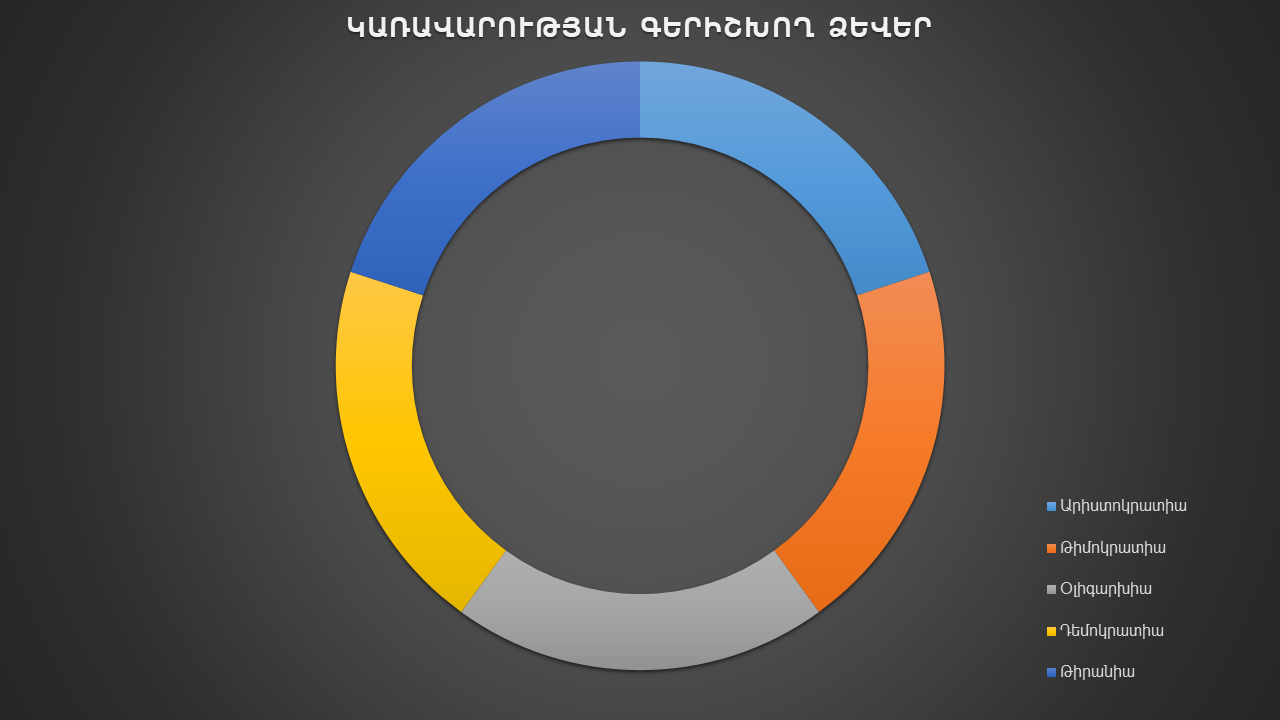 կառավարության գերիշխող ձևերը